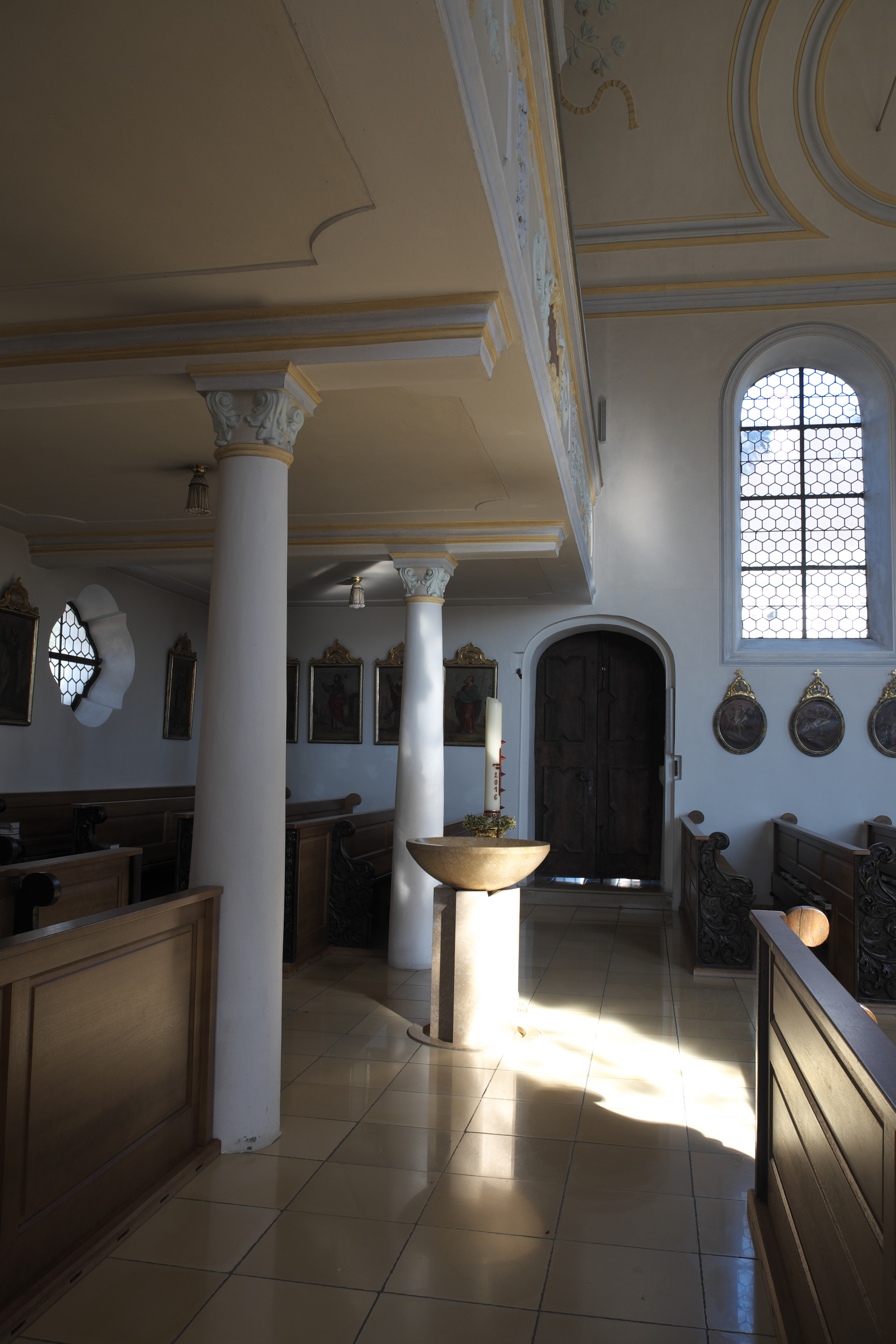 Katholische Pfarrkirche St. Martin in Penzing im Landkreis Landsberg am Lech (Bayern/Deutschland), Innenraum